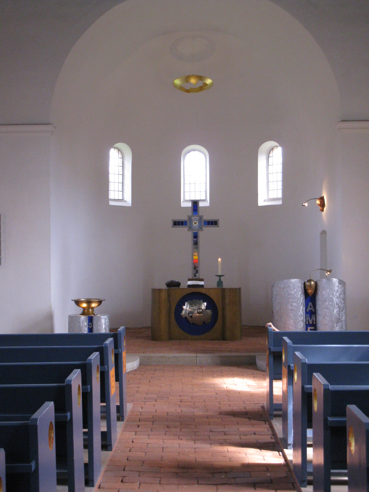 Blick auf das gesamte Ensembel im Chorraum der Kirche Küsten mit Altar, Taufe und Kanzel